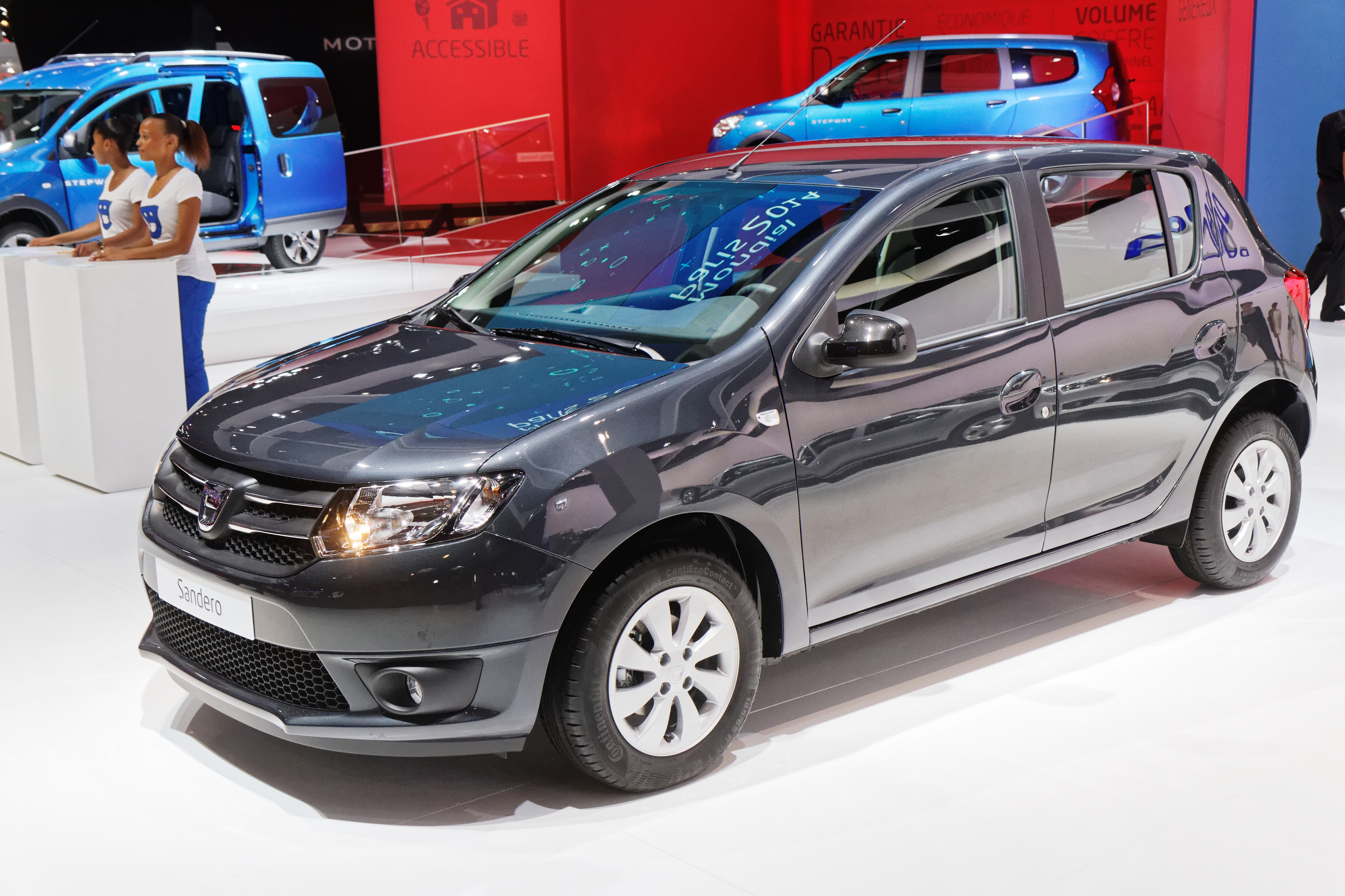 Une Dacia Sandero présentée lors du mondial de l'automobile de Paris 2014.